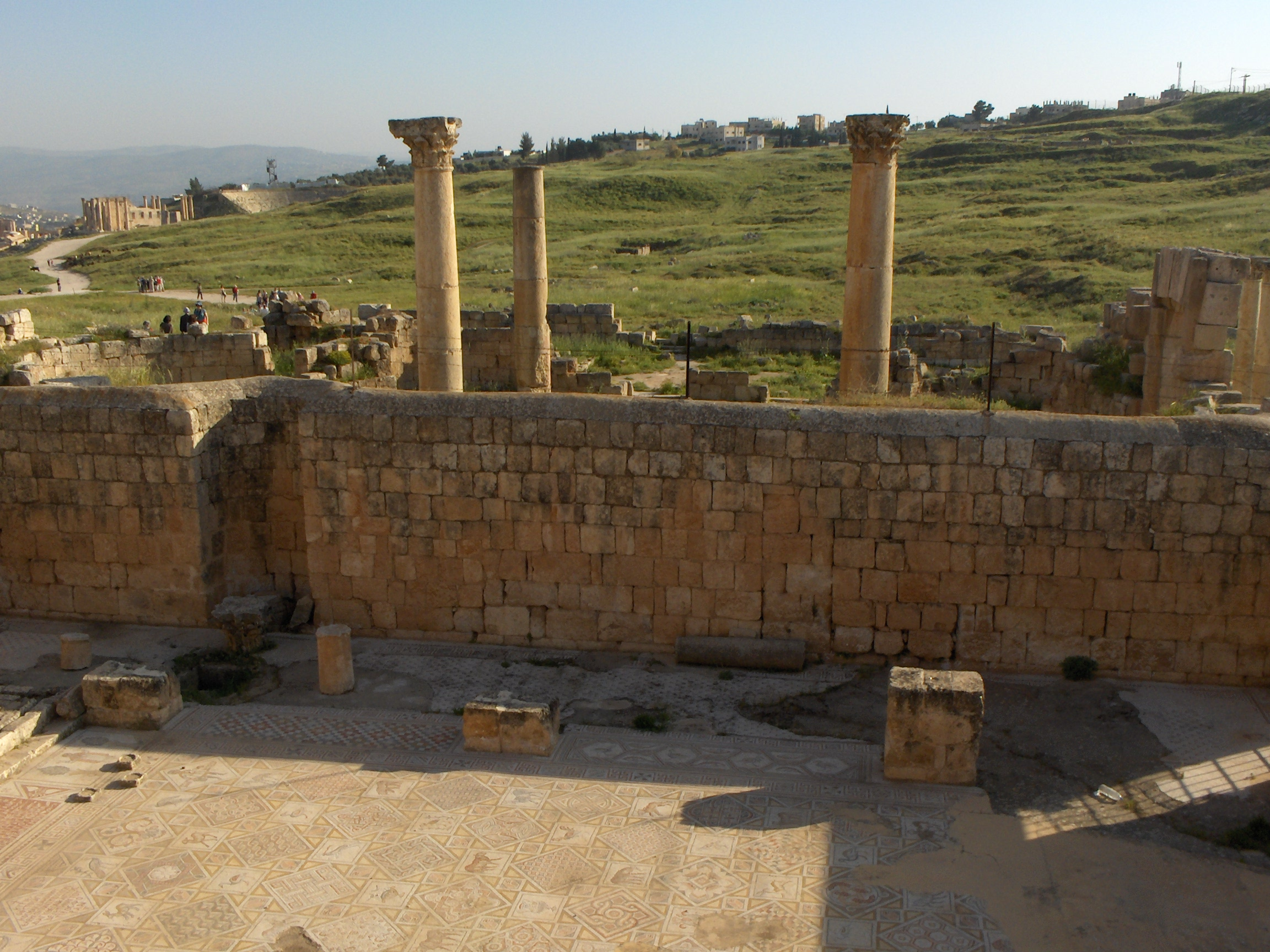 Colonne della chiesa di San Giovanni Battista di Jerash, Giordania